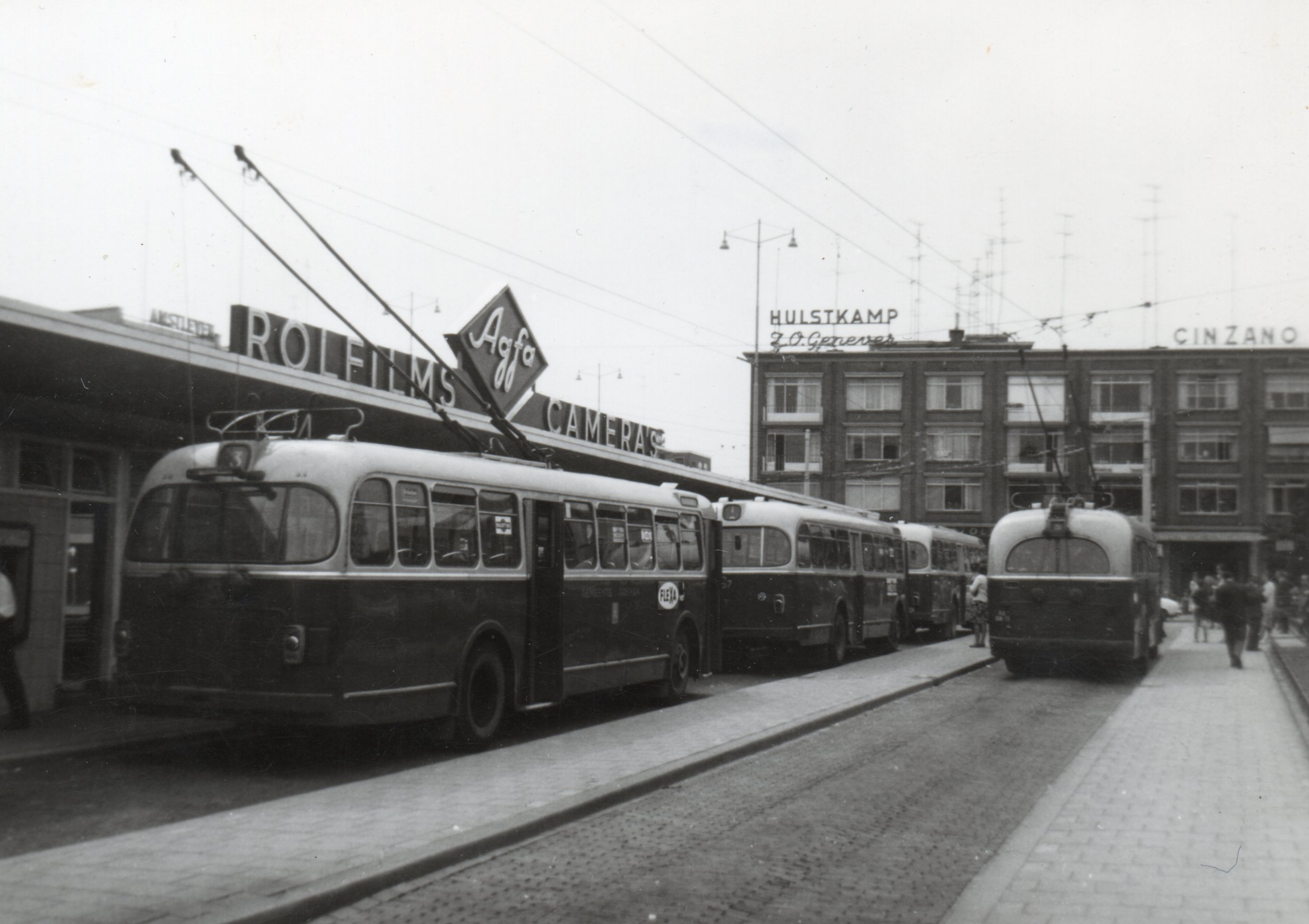 Trolleybussen op het Station in Arnhem